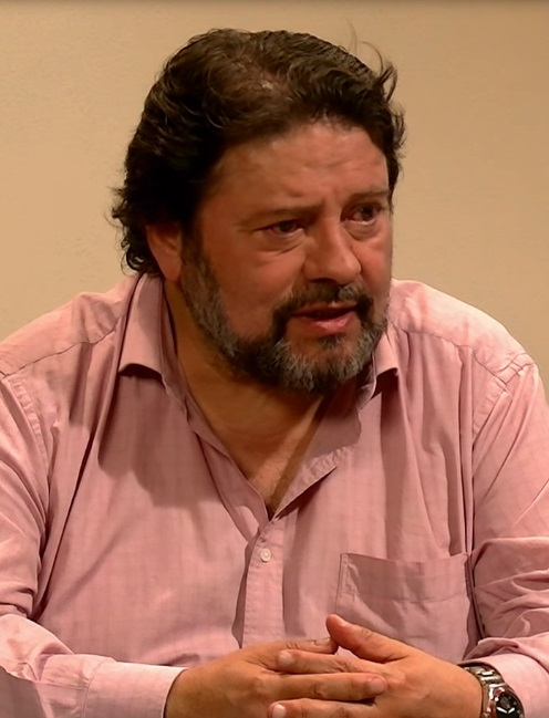 Raimundo Castro, 2016.